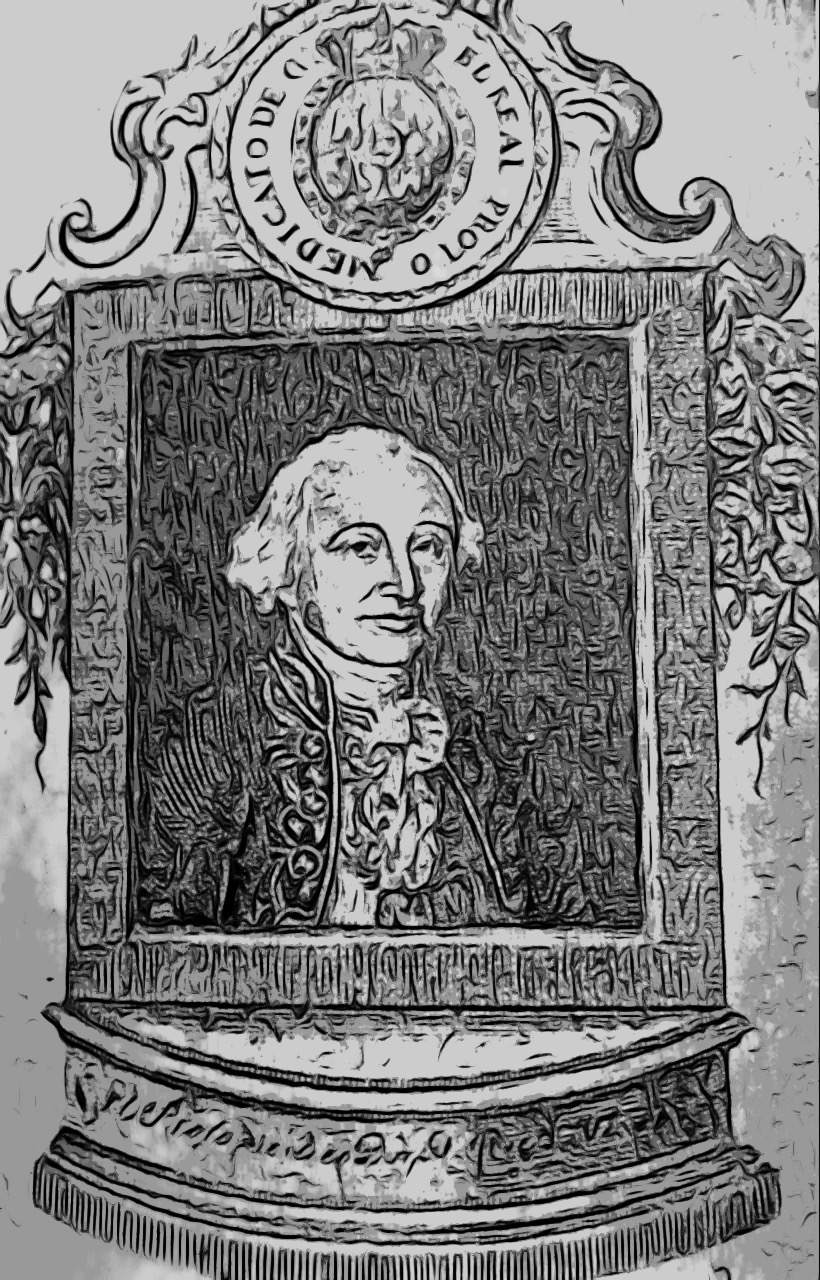 Retrato oficial del protomédico de Guatemala, Dr. José Felipe Flores.